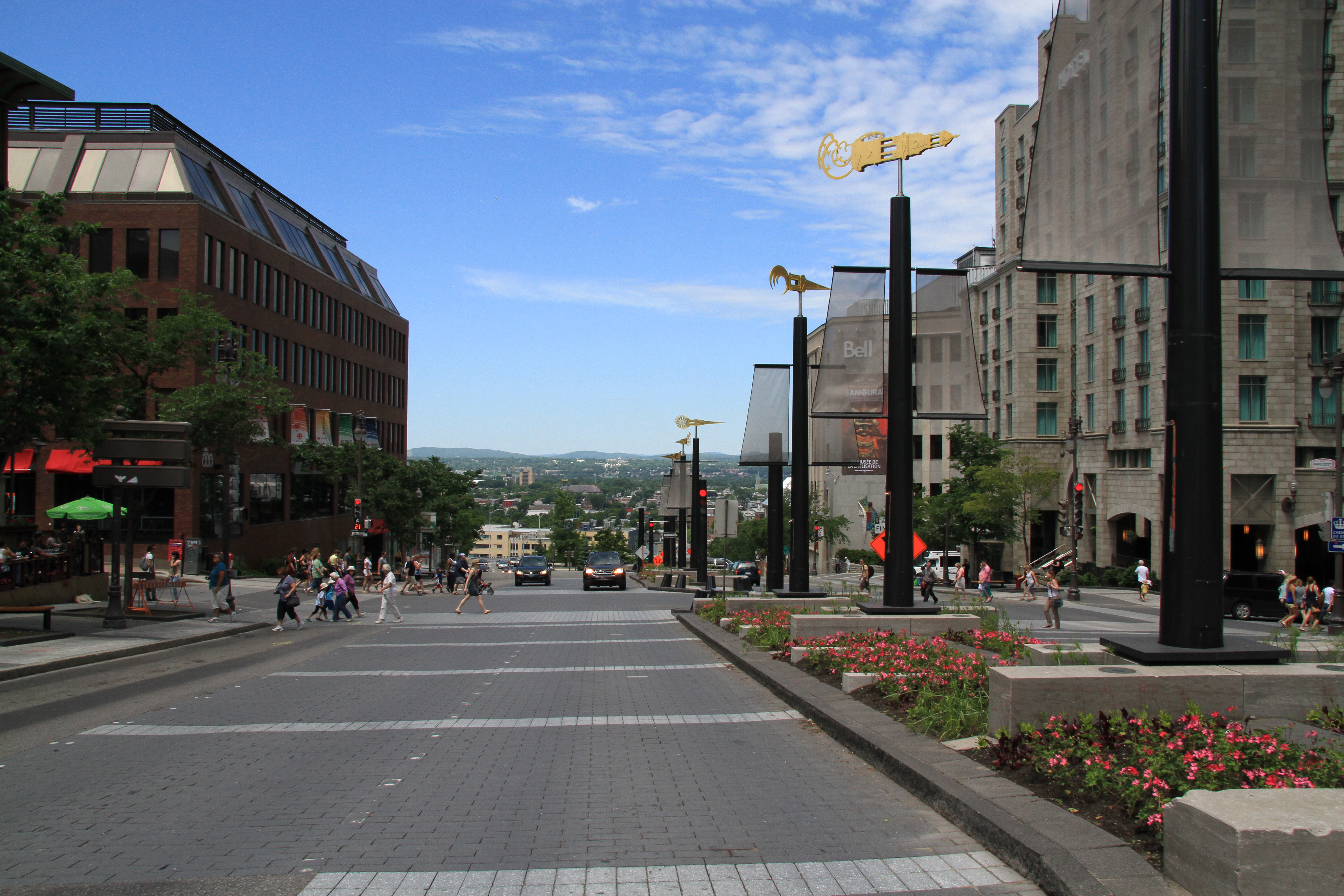 Vue Nord